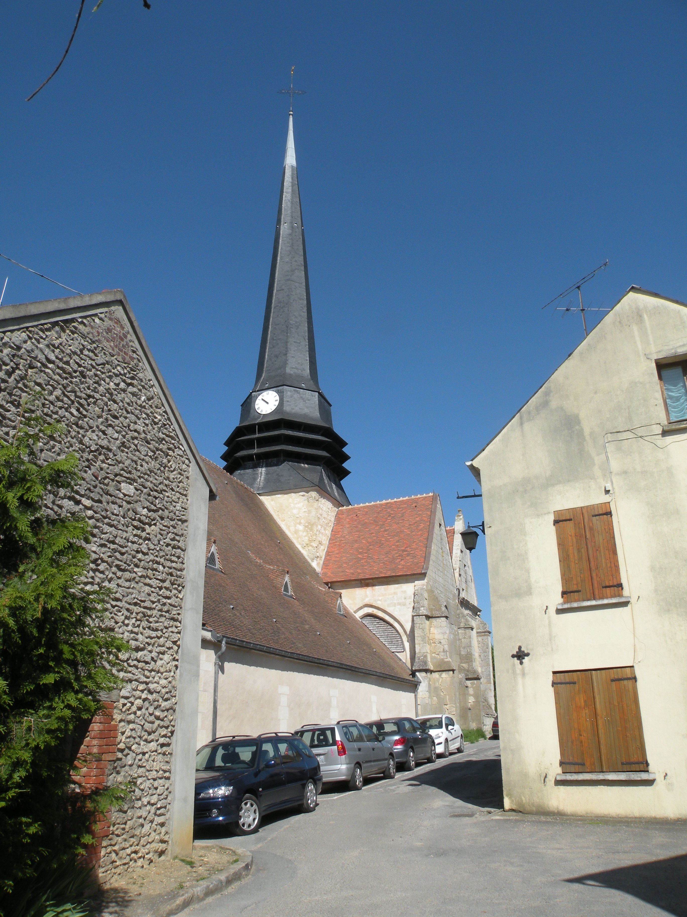 vue extérieur